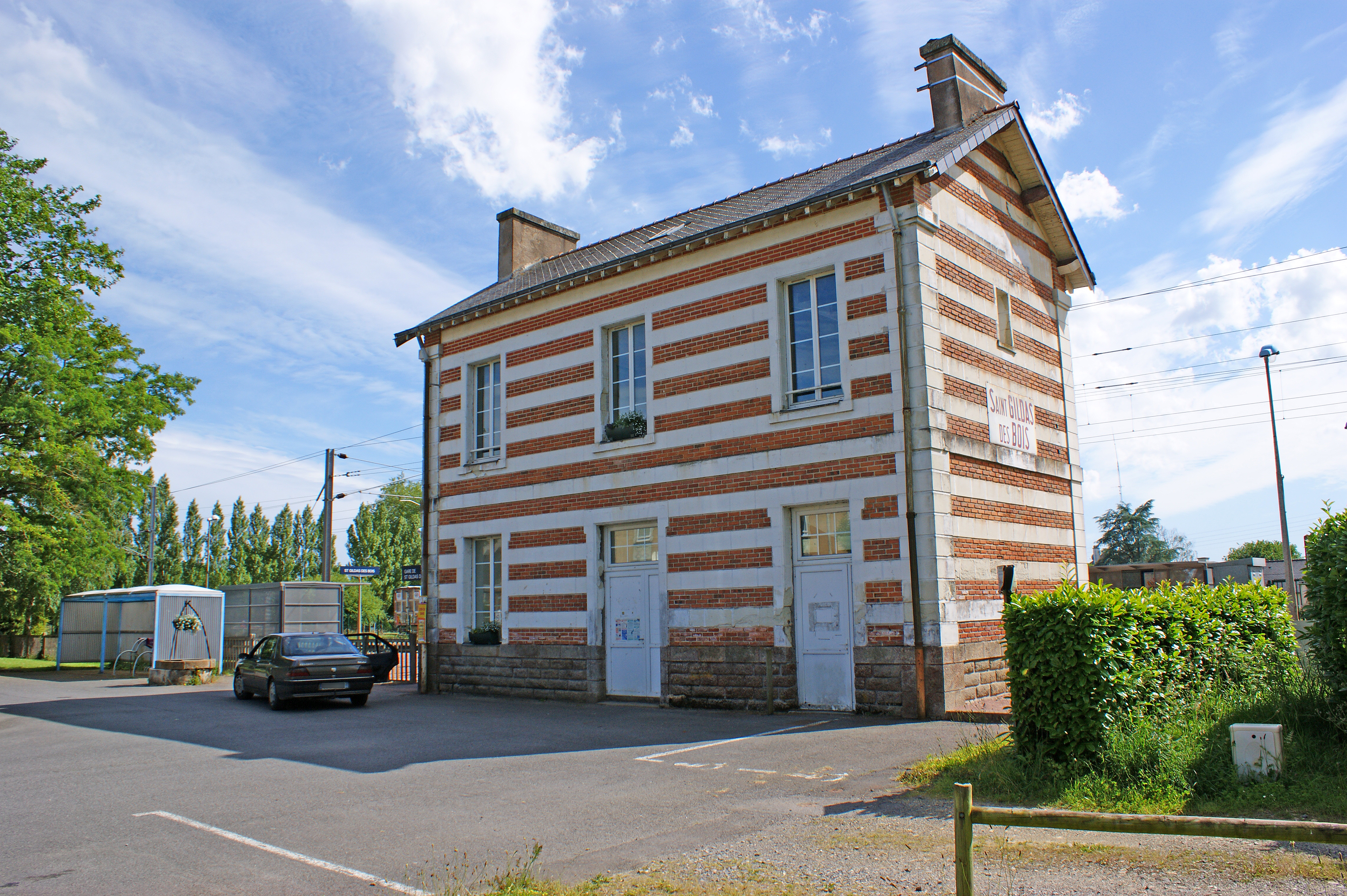 Gare de Saint-Gildas-des-Bois, l'ancien bâtiment voyageurs et l'entrée de la halte.